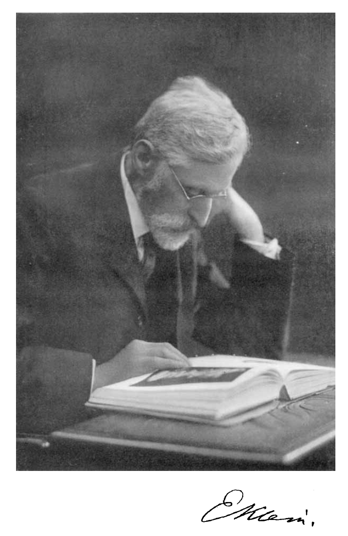 Emanuel Klein